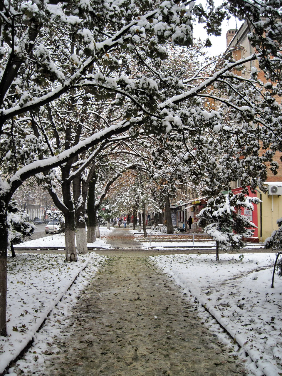 Улица Ватутина во Владикавказе, осенний снег.Ирон: Фæззыгон мит Дзæуджыхъæуы. Ватутины уынг централон базармæ ’ввахс.